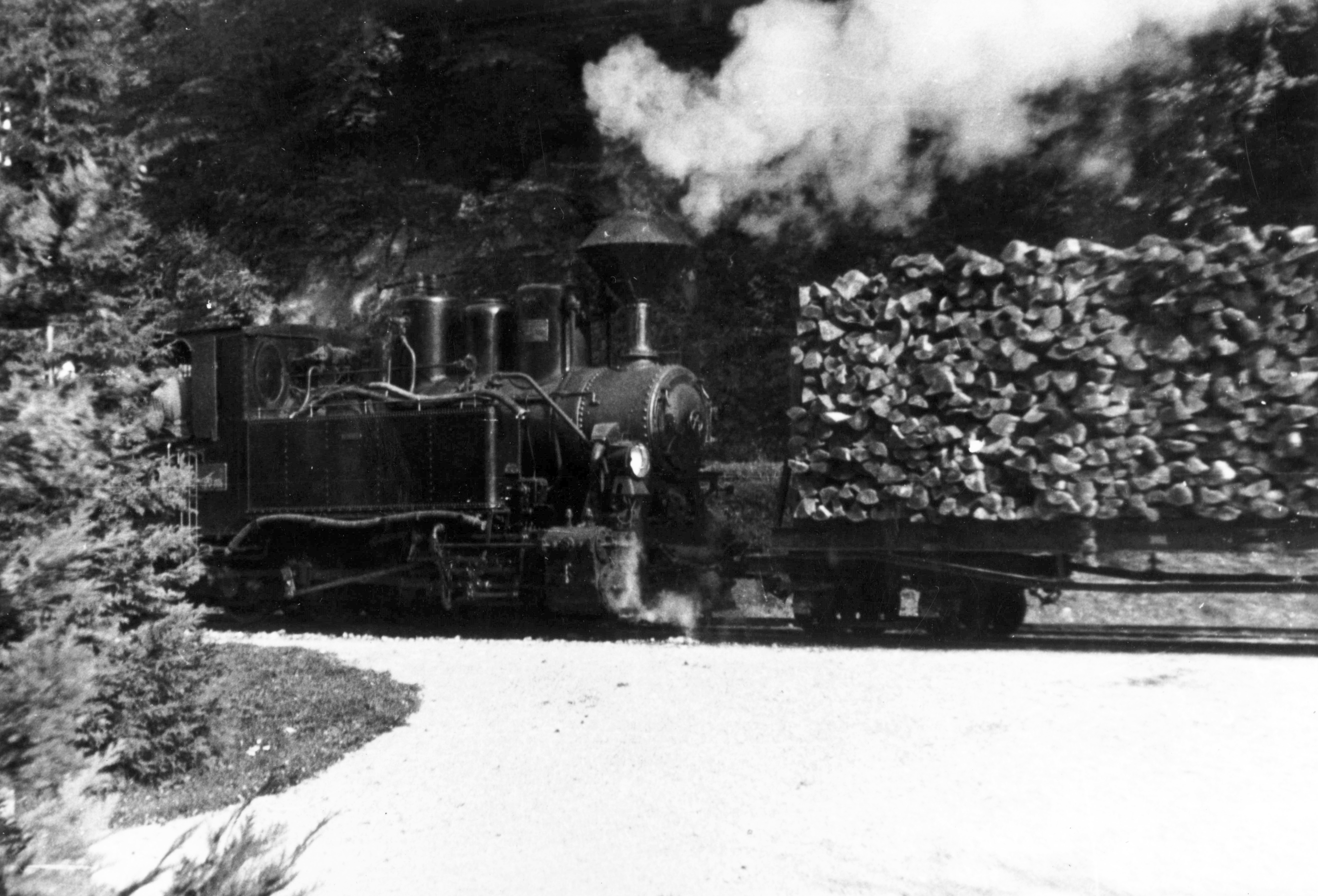 Gőzmozdony 1949-ben a Lillafüredi Erdei Vasúton